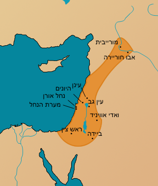 made by QWERTY. היקף משוער של ההתפשטות הנאטופית בשיאה. יוצר: גיא מבוסס על פריסת ישובים ומפות ב־[1] (ע' 160; 162) ו־[2] .